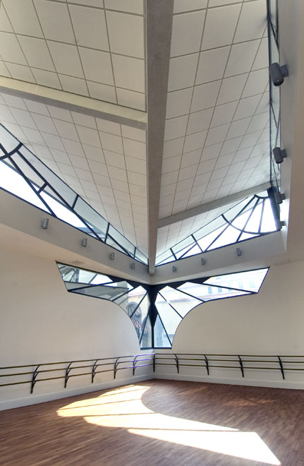 Le Puy en Velay, Atelier des arts Salle de Danse, Porro-de La Noue architectes